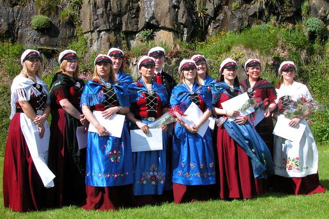 Færøske studenter, piger